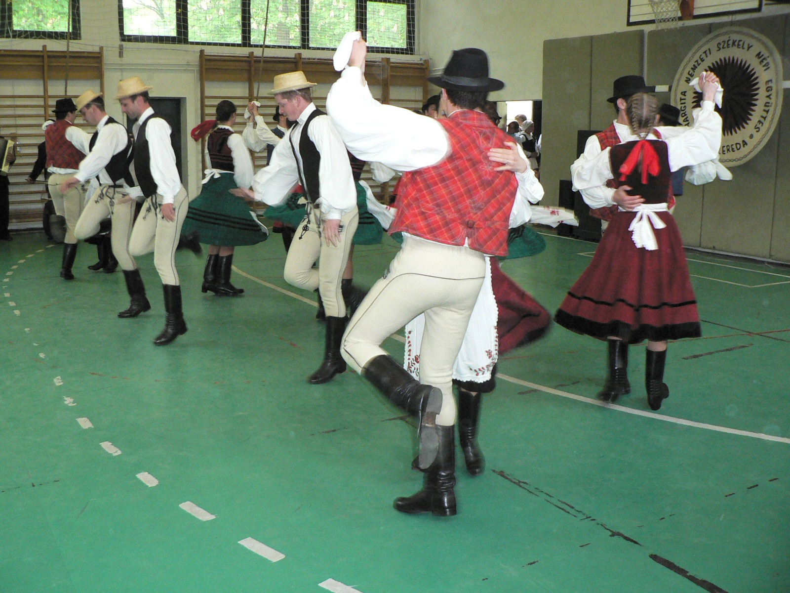 A Hargita Nemzeti Székely Népi Táncegyüttes fellépése Solymáron